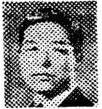 한국의 정치인 김종필